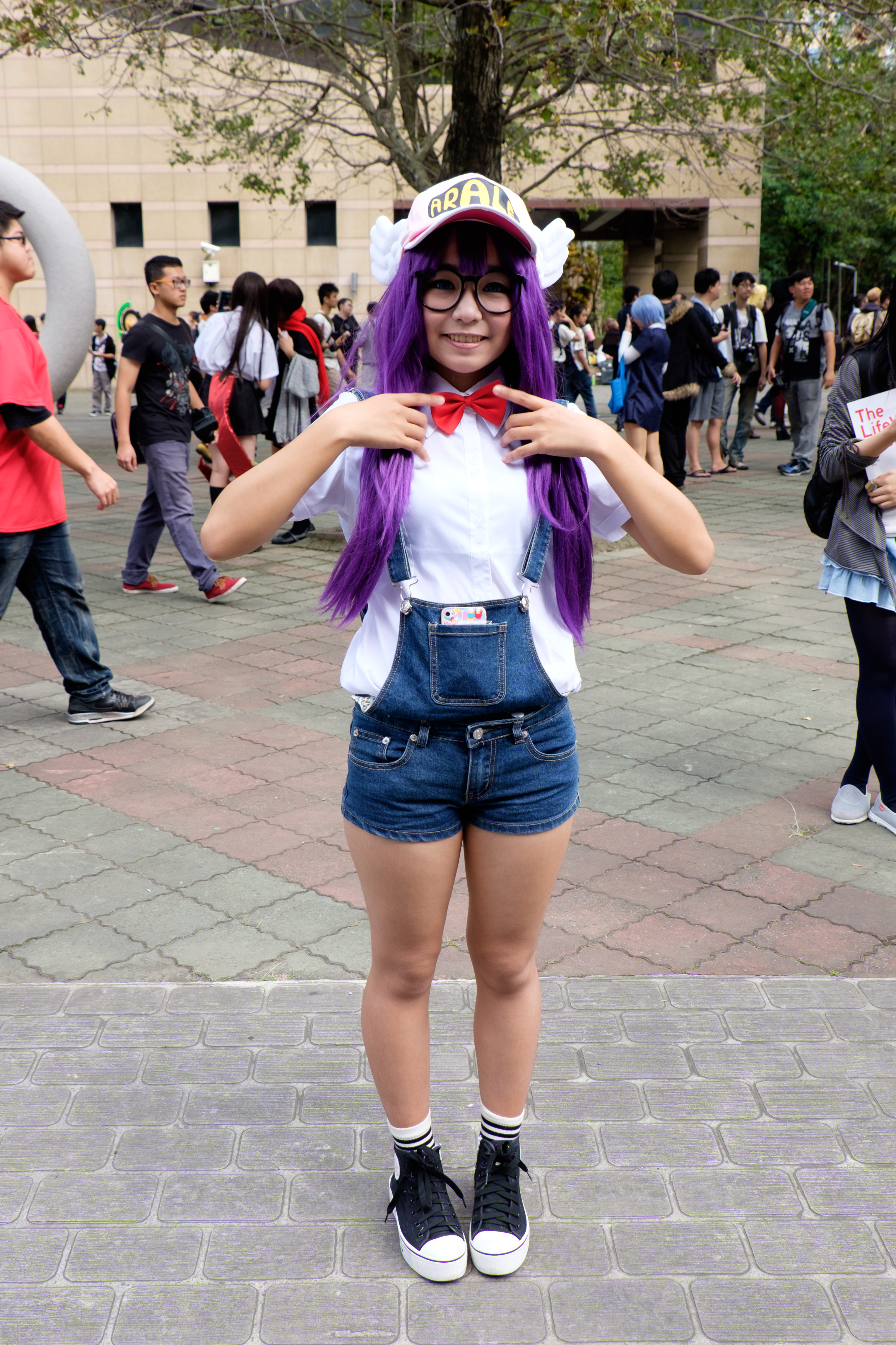 PF23第二日下午，＜Dr.スランプ アラレちゃん＞則巻アラレcosplayer。